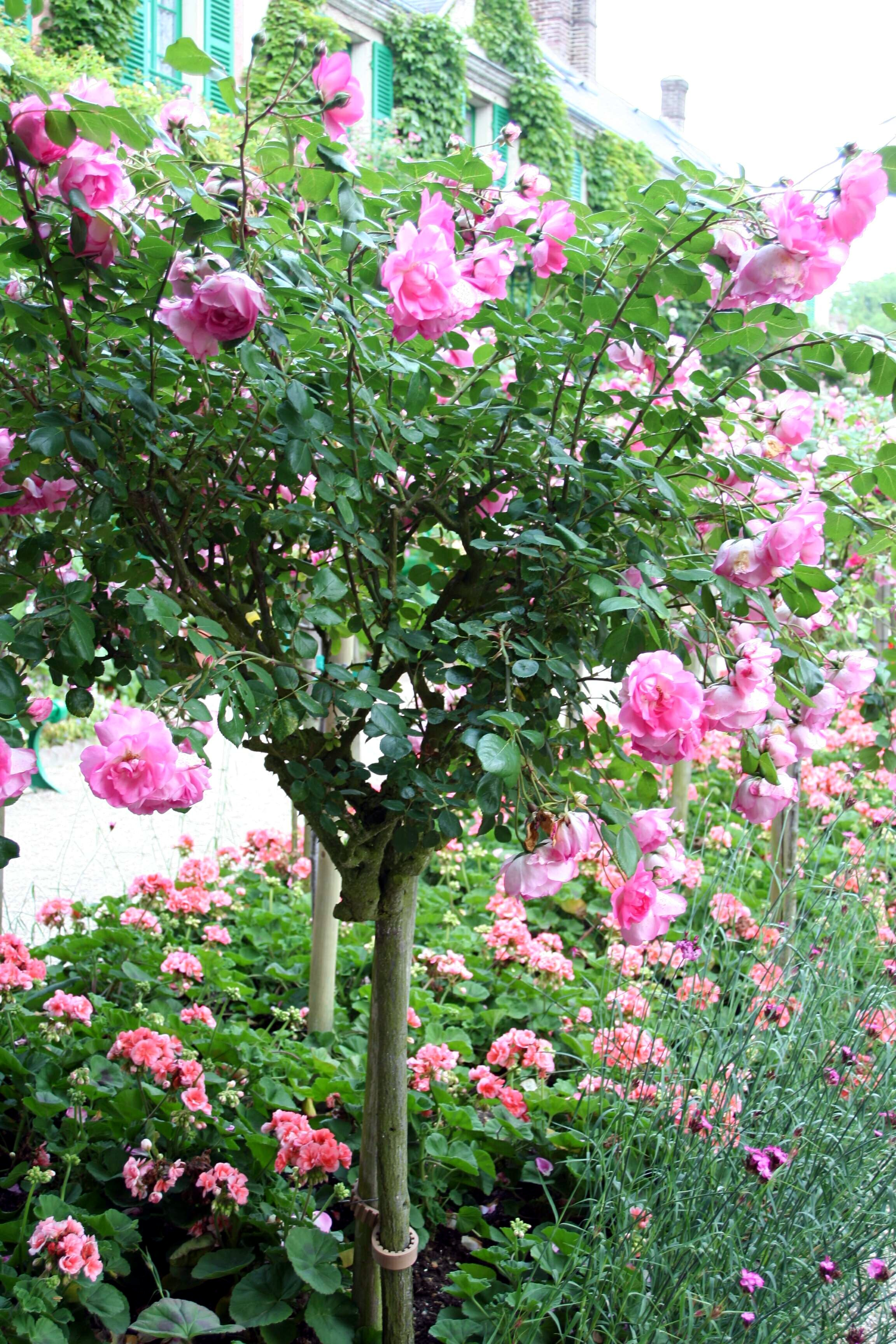 Rose 'Centenaire de Lourdes' photographiée dans le jardin de Claude Monet à Giverny - Eure (France)